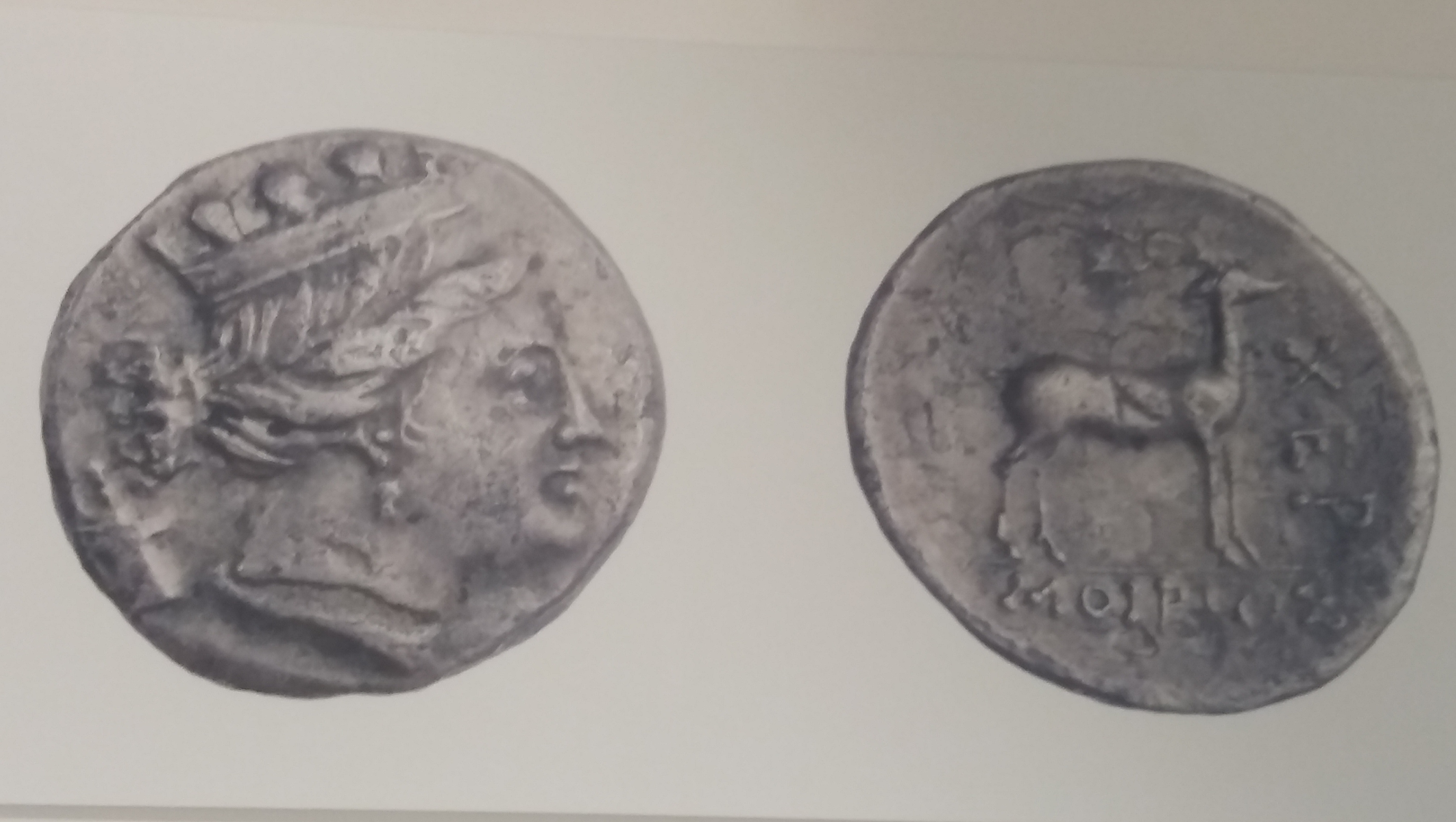 Изображение Девы на херсонесской монете. Херсонесский музей, античный зал.